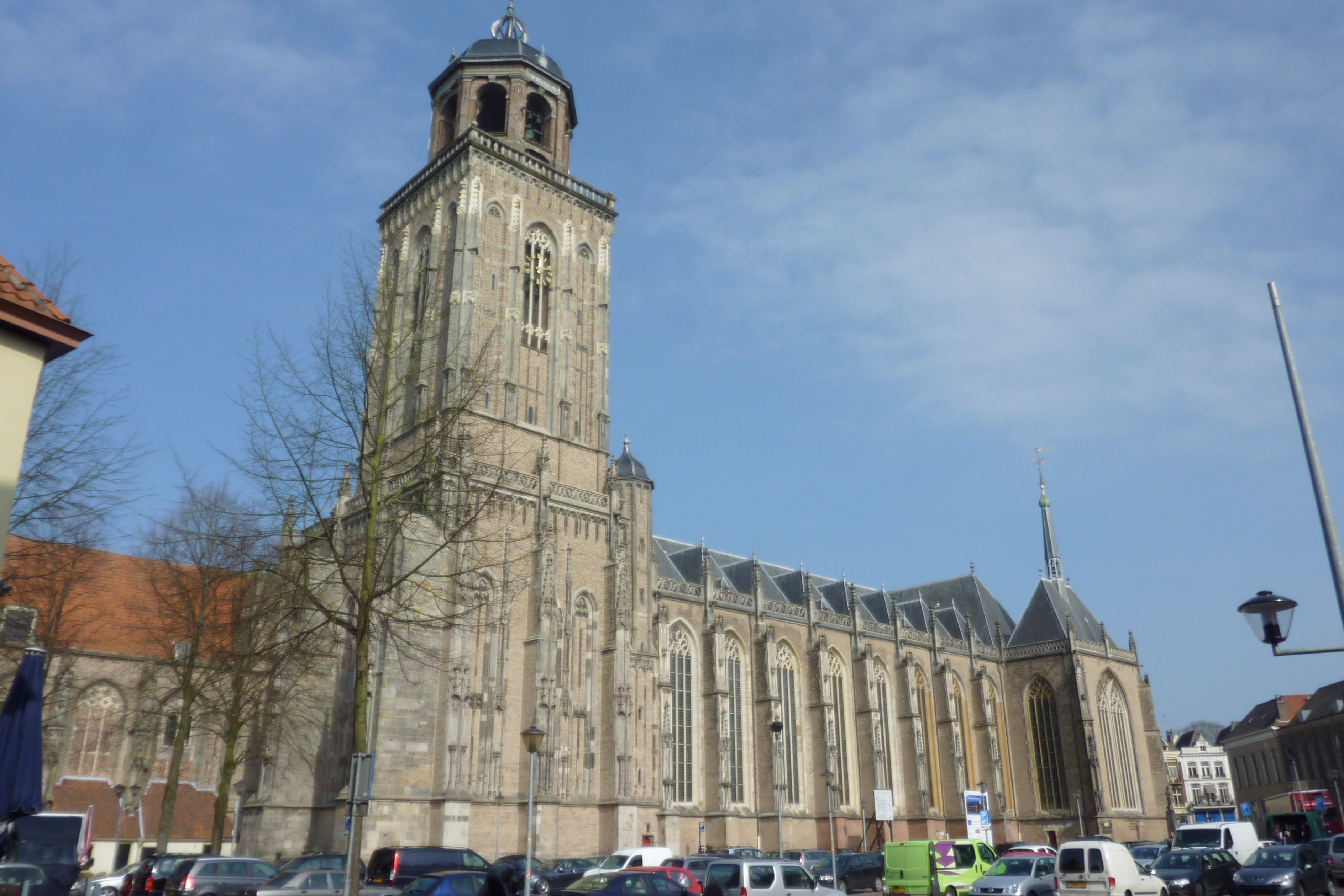 Deventer: Grote of Lebuïnuskerk, zuidzijde